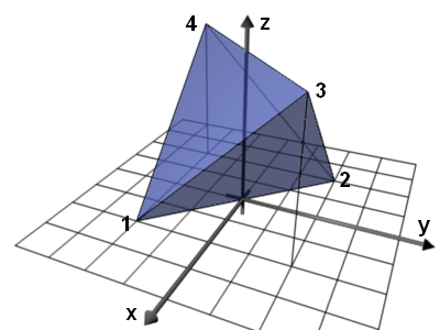 Grafik eines Tetraeder im Koordinatensystem